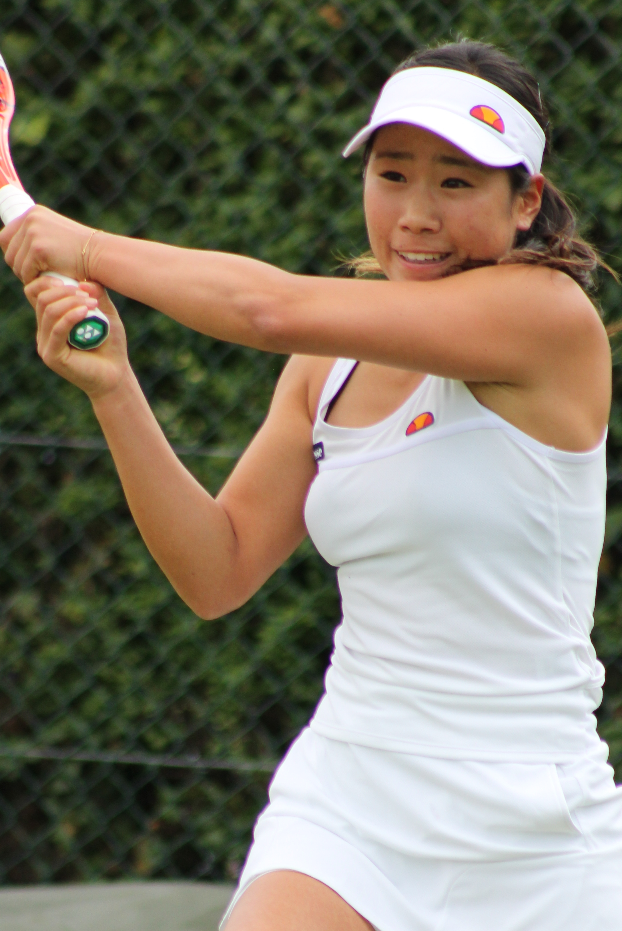 Hibino WMQ15 (7)